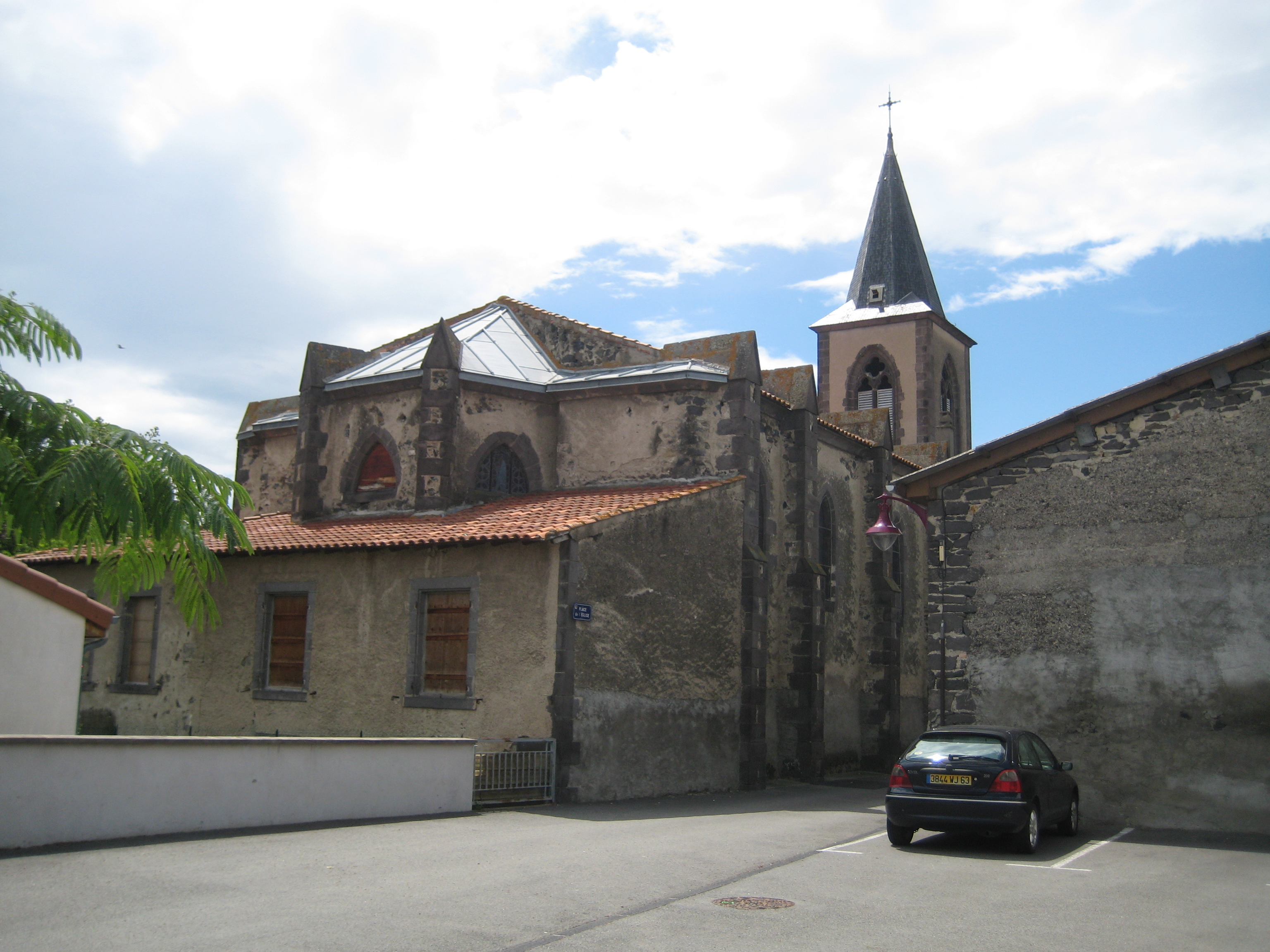 église de Malintrat